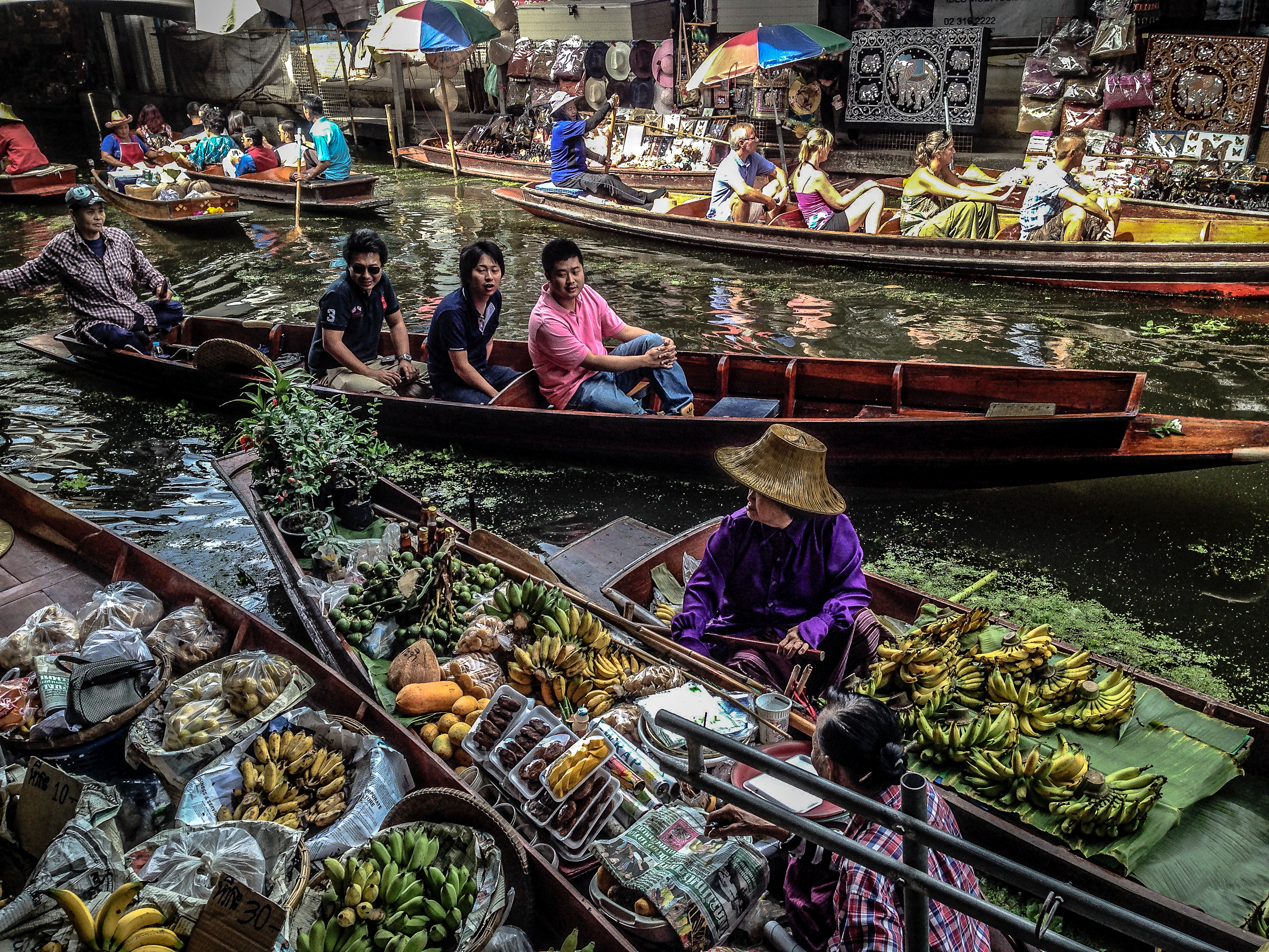 Damnoen Saduak Floating Market in Thailand